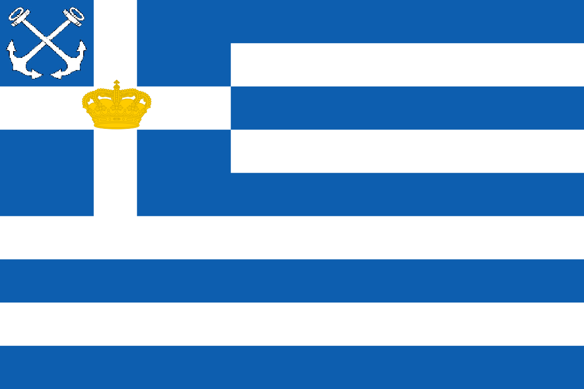 Σημαια Λιμενικού Σώματος 1919-1973